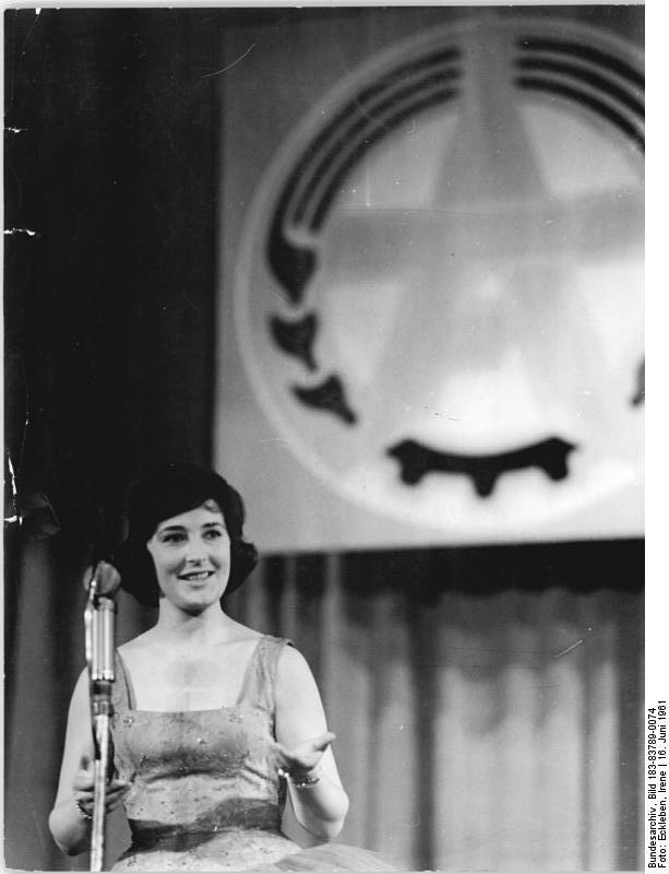 Magdeburg, 3. Arbeiterfestspiele, Renée Franke Zentralbild Eckleben 16.6.1961 3. Arbeiterfestspiele des FDGB. "Fest der Neuerer" in Magdeburg. Ausklang des Tages der Neuerer, die am Vormittag des 13.6.1961 über die schnelle Einführung von Verbesserungsvorschlägen in die Produktion berieten, war am Abend ein großer Ball im Kristallpalast. Zusammen mit den Arbeitern aus der DDR feierten westdeutsche, sowjetische und ungarische Gäste. Für sie sangen und spielten u.a. das Berliner Tanzorchester Alo Koll und die westdeutsche Schlagersängerin Renee Franke. UBz: Die westdeutsche Schlagersängerin Renee Franke.